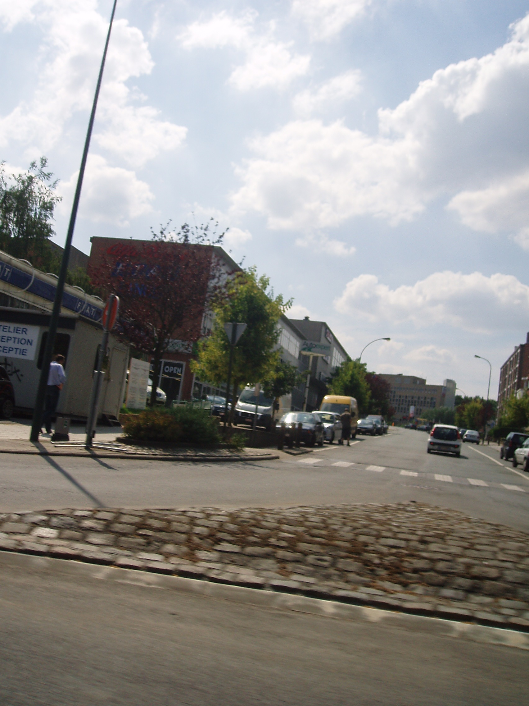 boulevard des Invalides Auderghem Belgium